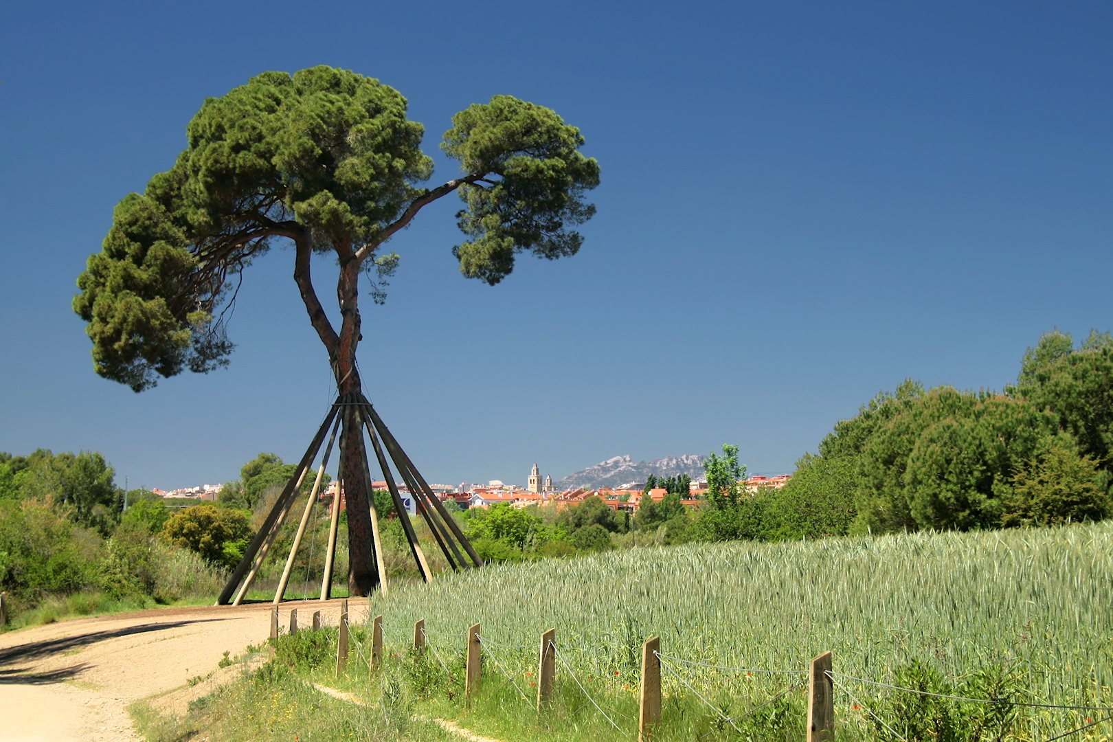 Pi d'en Xandri